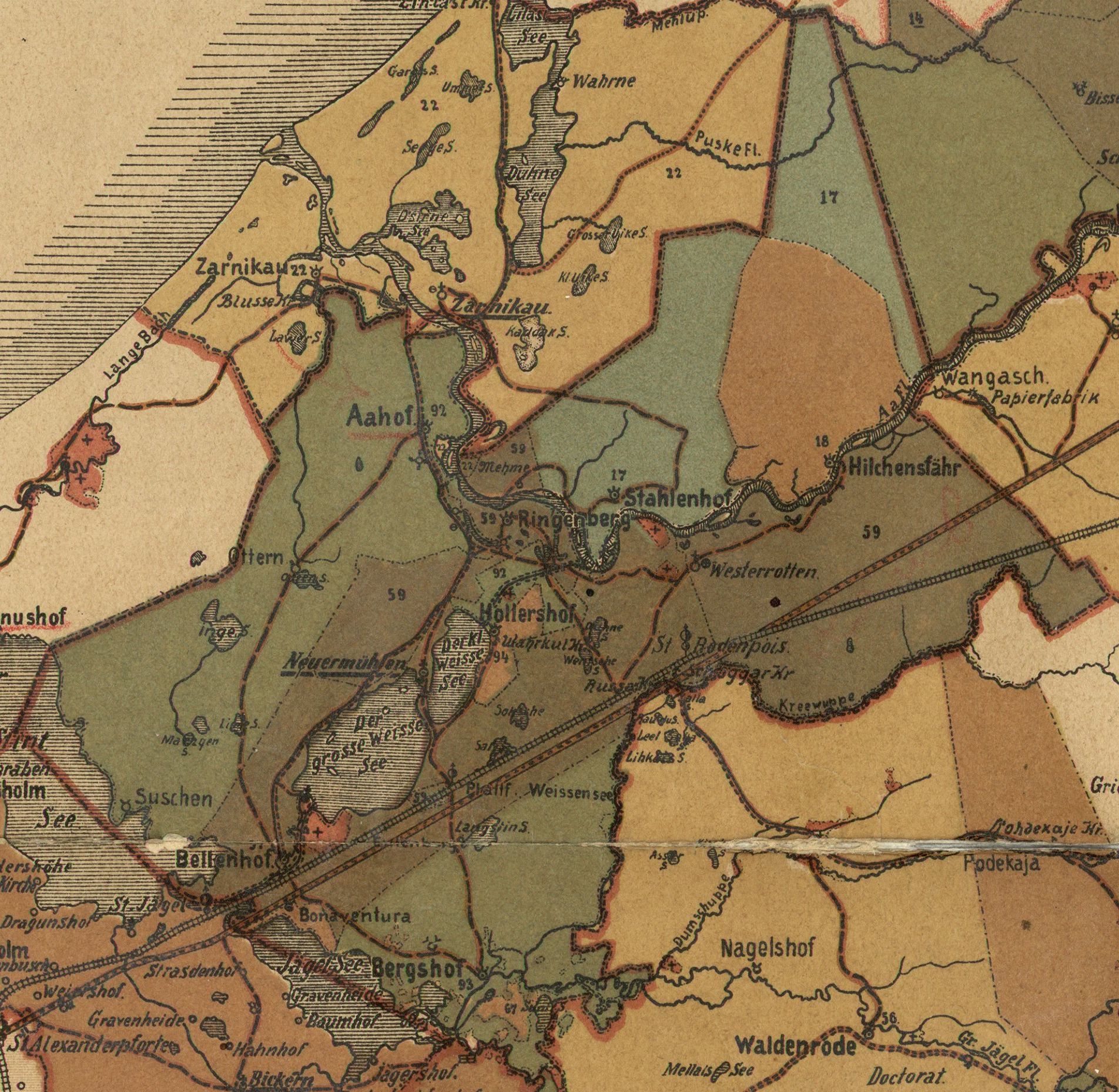 Ādaži kihelkonna mõisad 1905. aasta kaardil (parandatud)